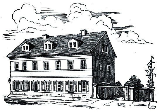 Das erste Haus der Dresdner Diakonissenanstalt auf der Böhmischen Gasse 13 (heute Böhmische Straße 30), das von 1844 bis 1846 genutzt wurde.